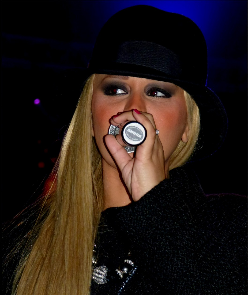 Lââm, Décembre 2013 à Perpignan